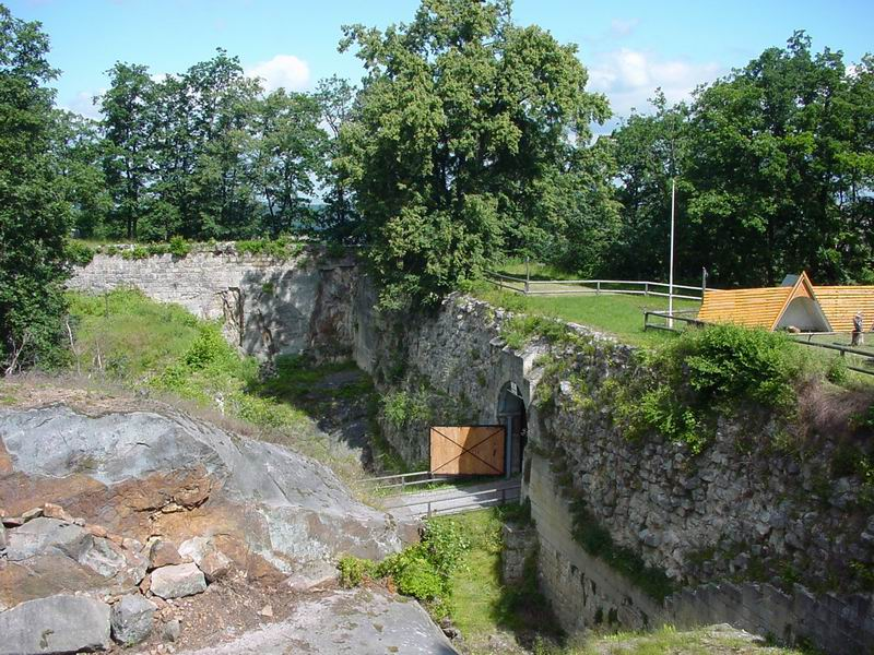 Regenstein - Festungstor und Graben